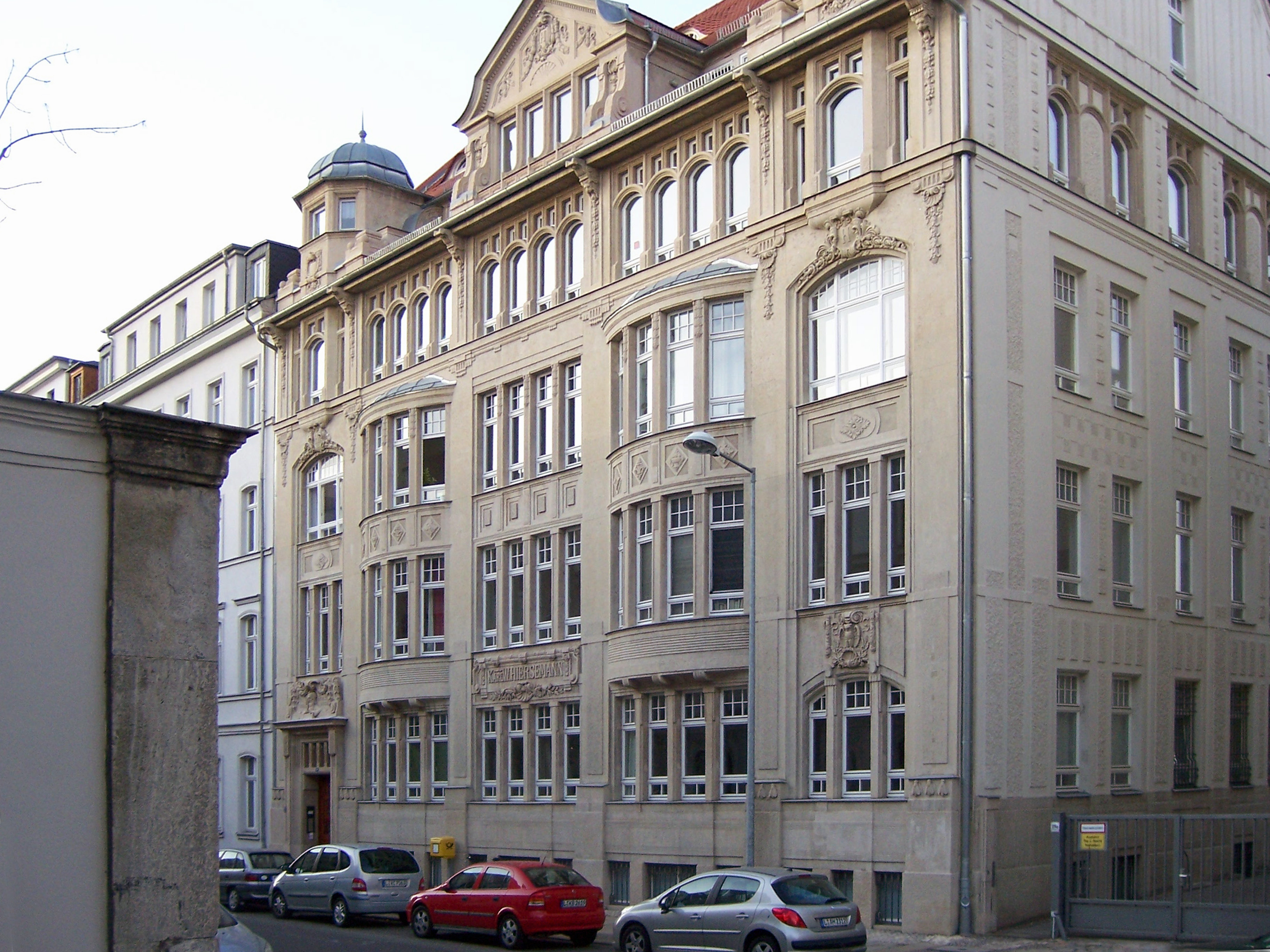 Ehemaliges Verlagsgebäude K. W. Hiersemann in Leipzig